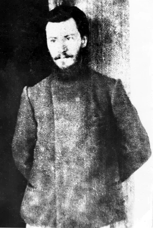 Пётр Людовикович Драверт в 1906 году в ссылке в Якутии.